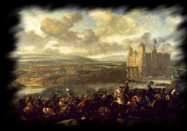 Schlacht von Chocim 1621